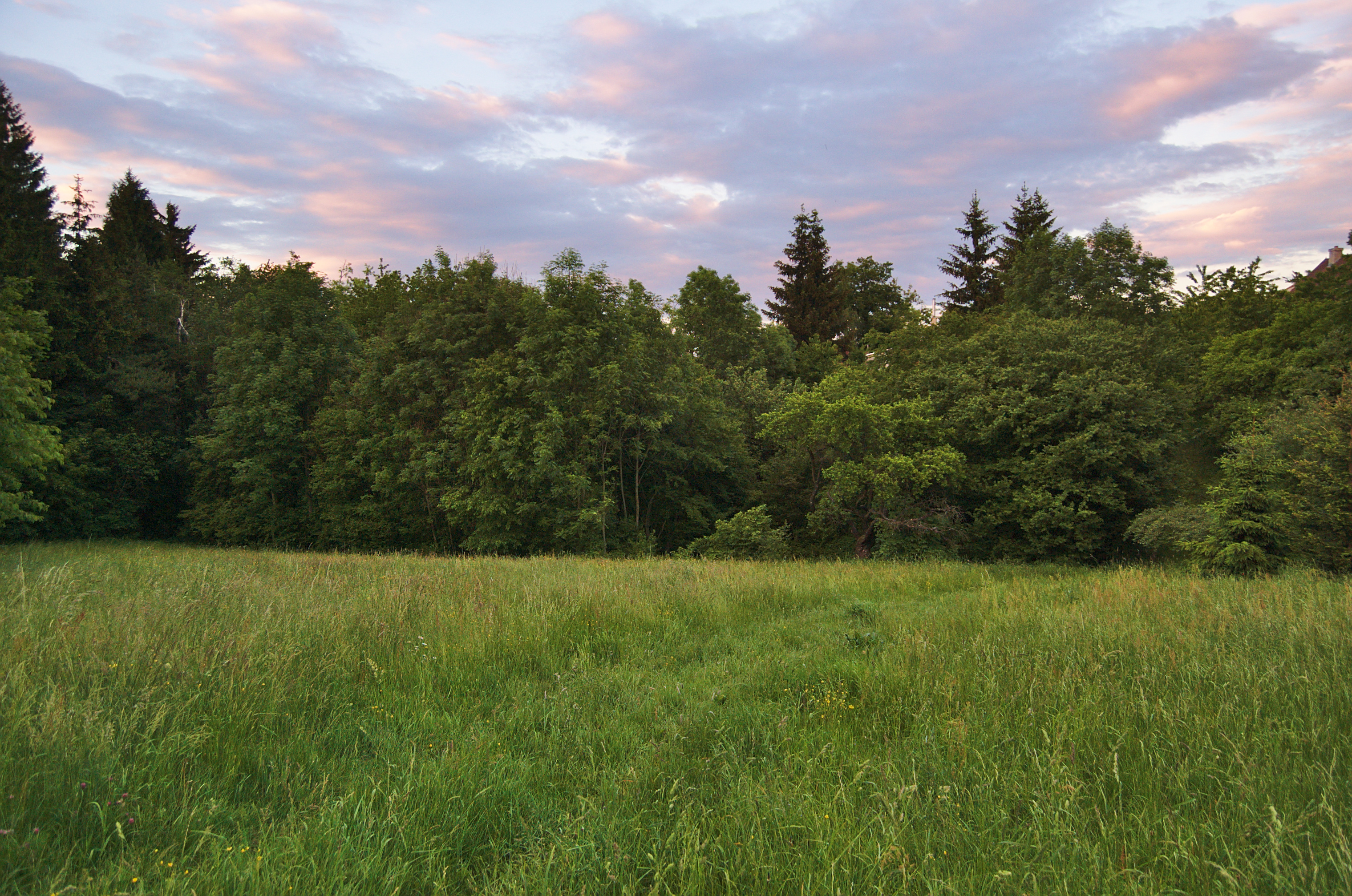 Bývalá přírodní památka Pod Panským lesem, okres Prostějov Project: Fotíme Česko